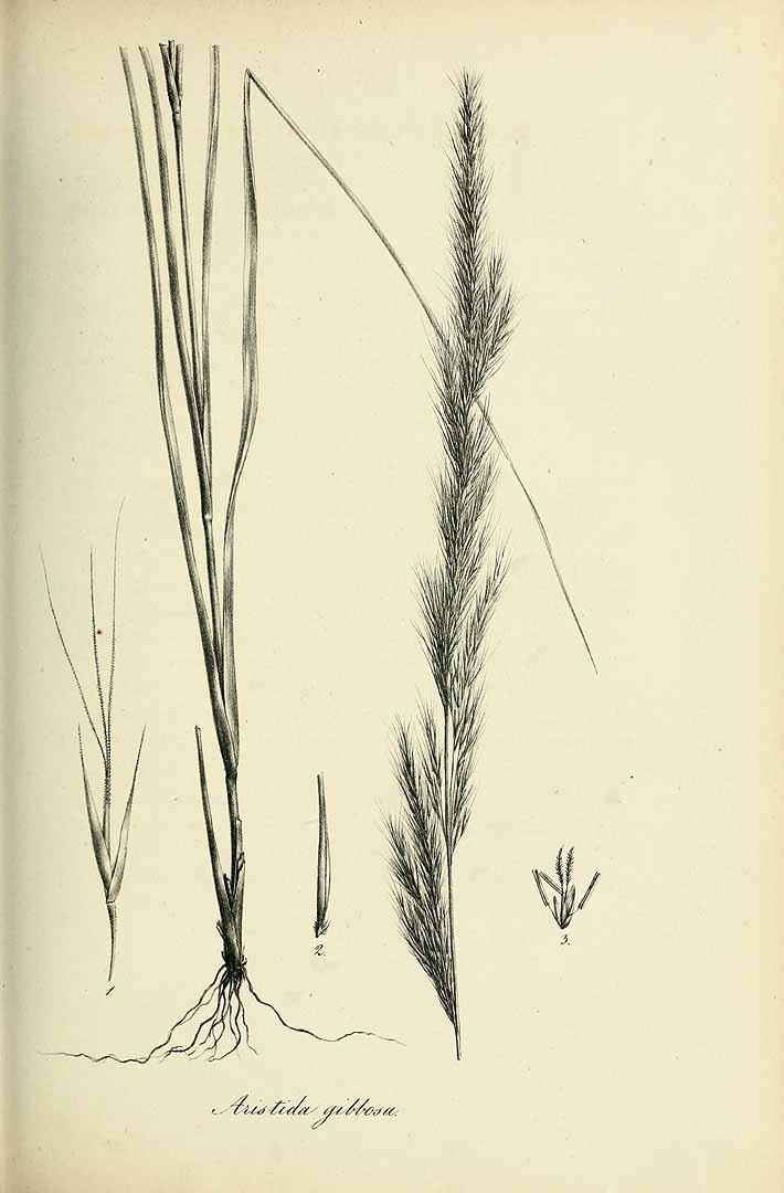 Aristida gibbosa (Nees) Kunth